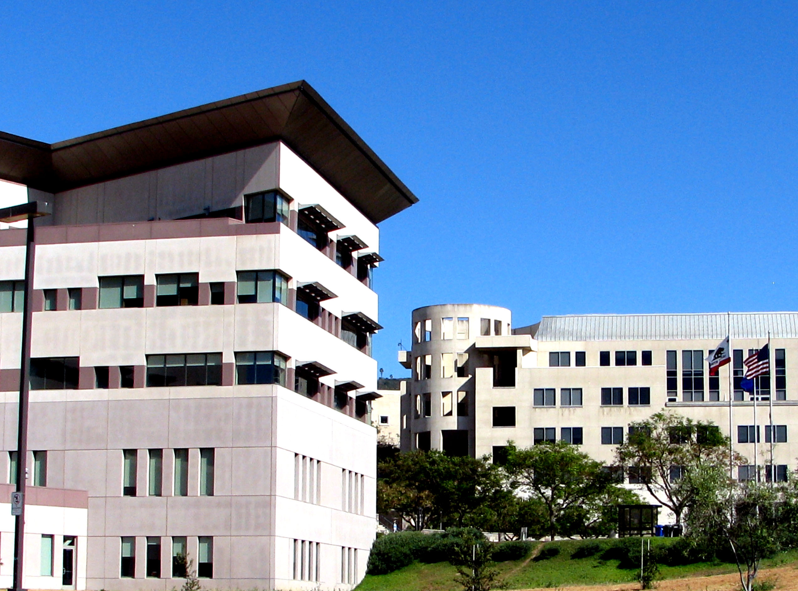 csusm